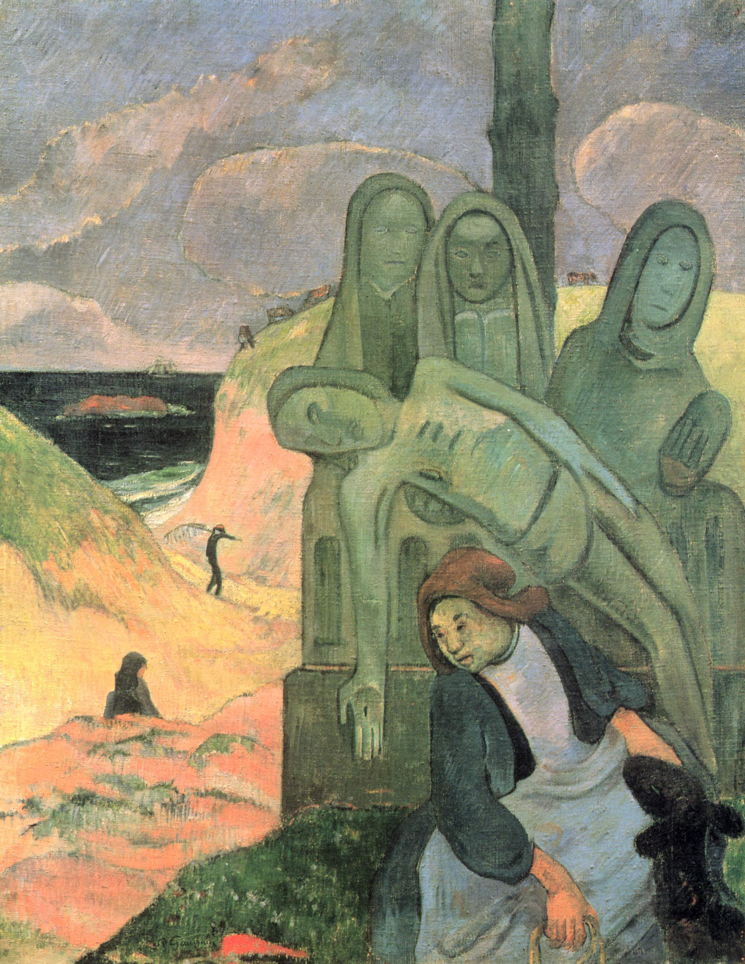 Inspiré du calvaire de Nizon en Pont-Aven (Finistère).